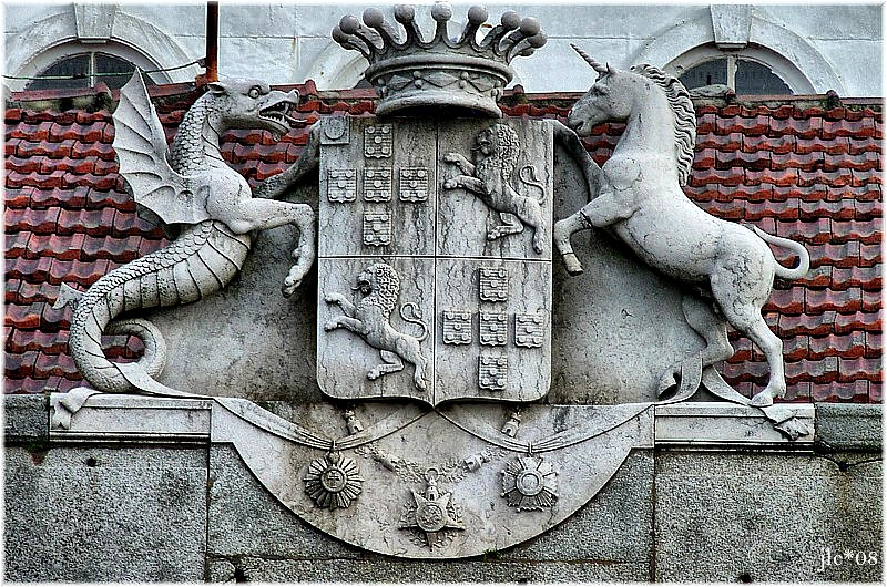 1959-Escudo en Oporto. Brasão de Sousa, Conde da Trindade